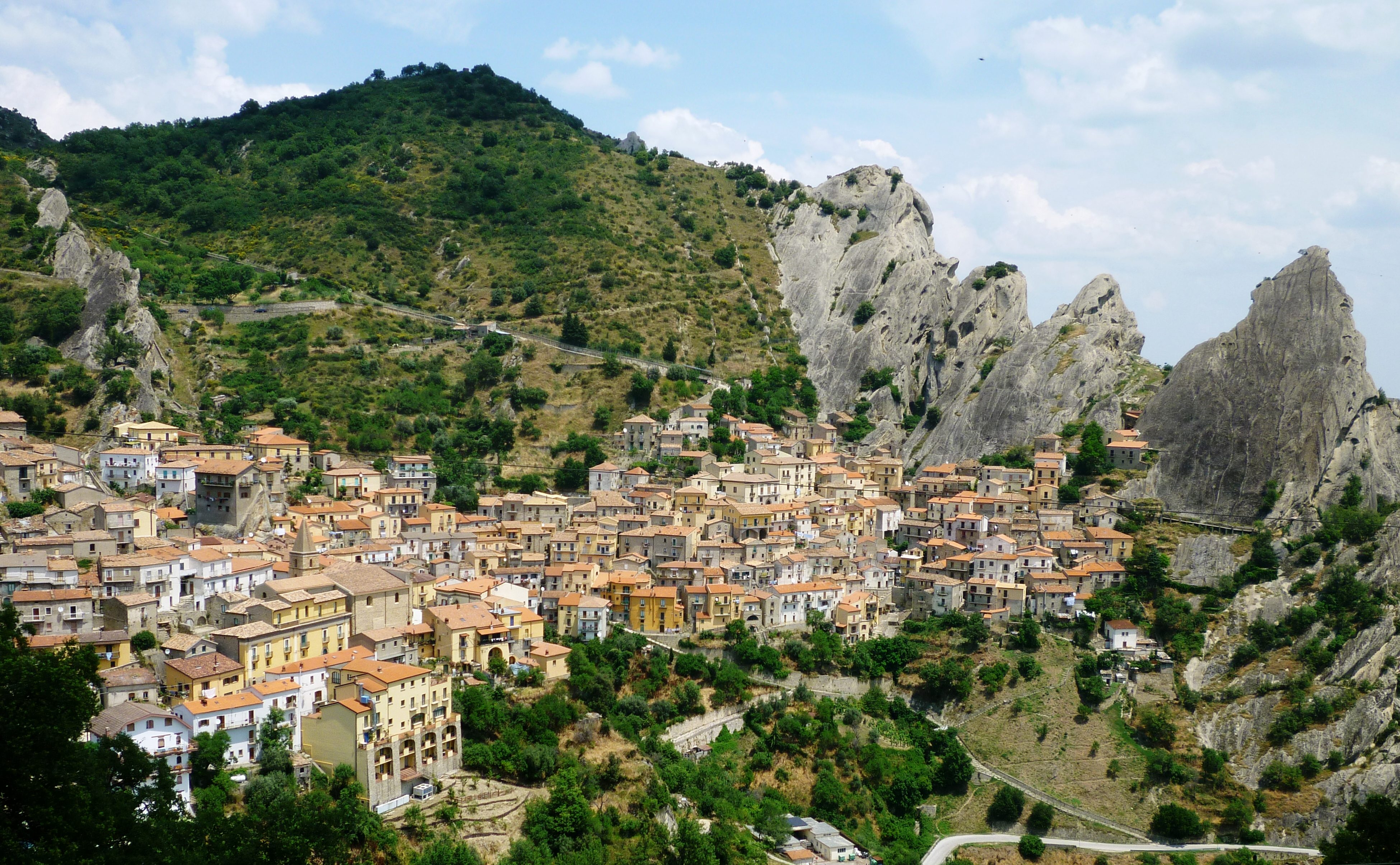 Castelmezzano